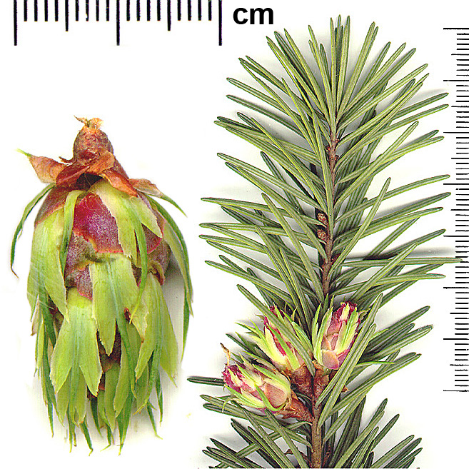 Pseudotsuga_menziesii cones